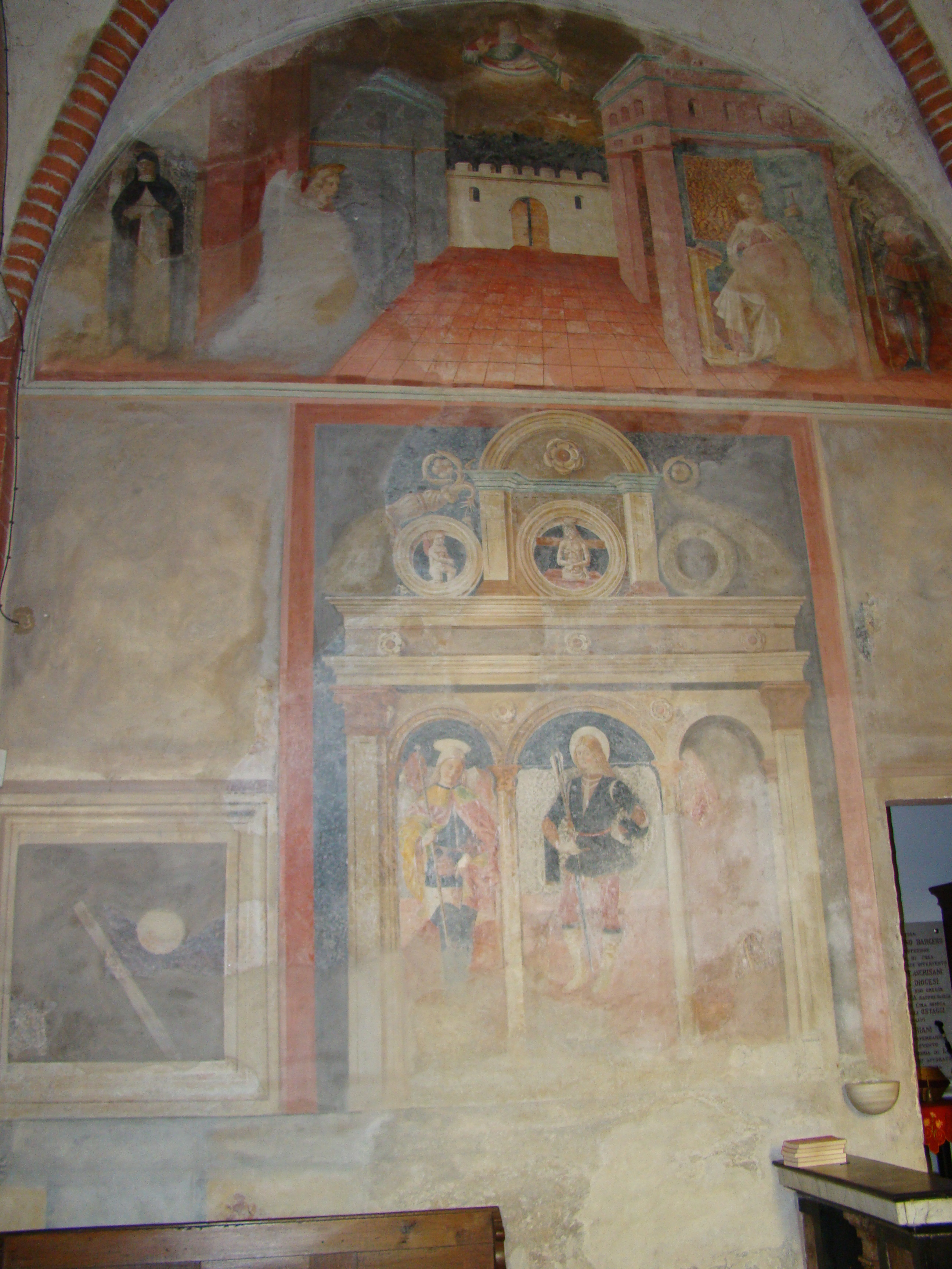 parete Spanzottiana - Annunciazione . trittico di Santi e affresco misterioso